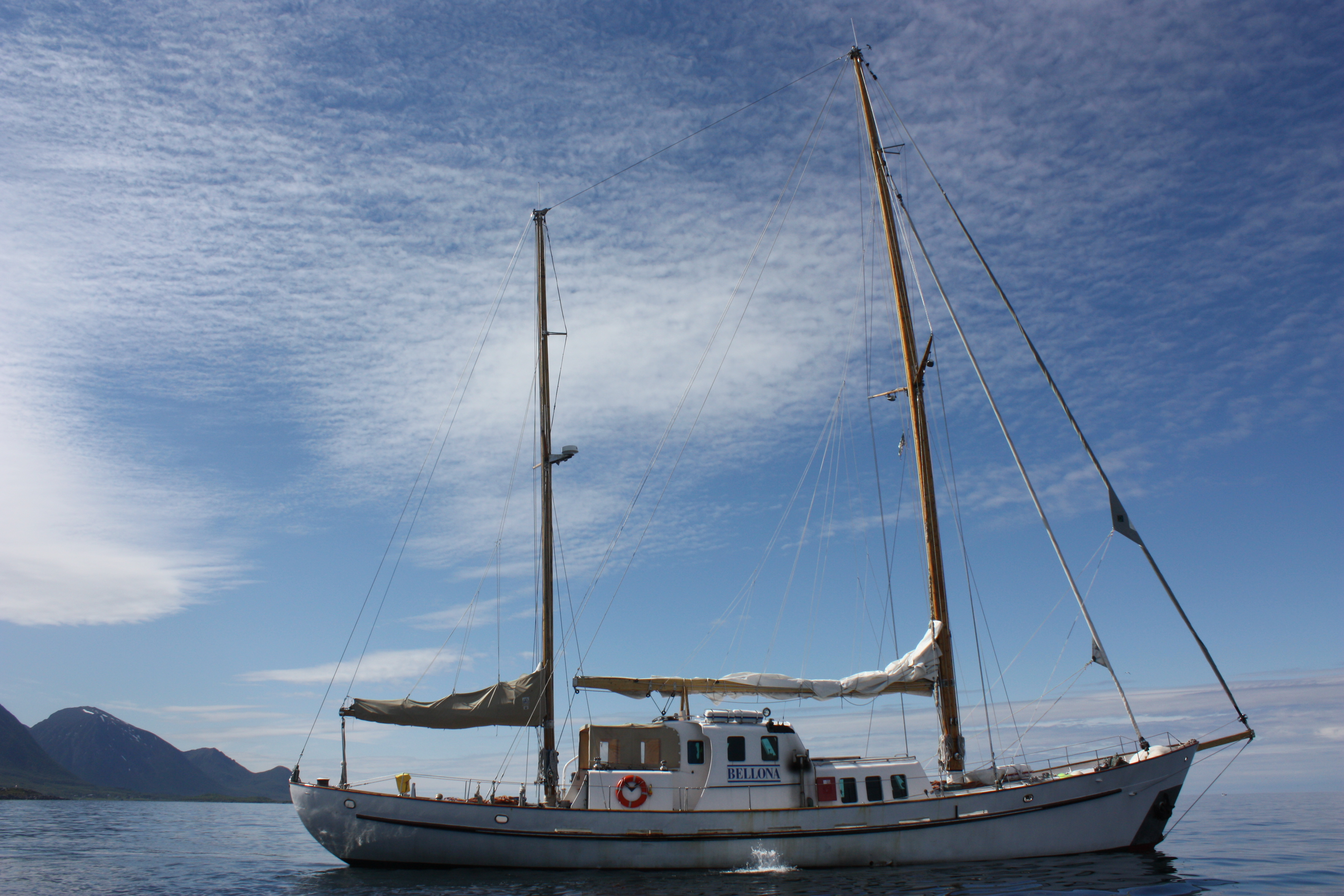 Bellonas Miljøpatrulje i Vesterålen